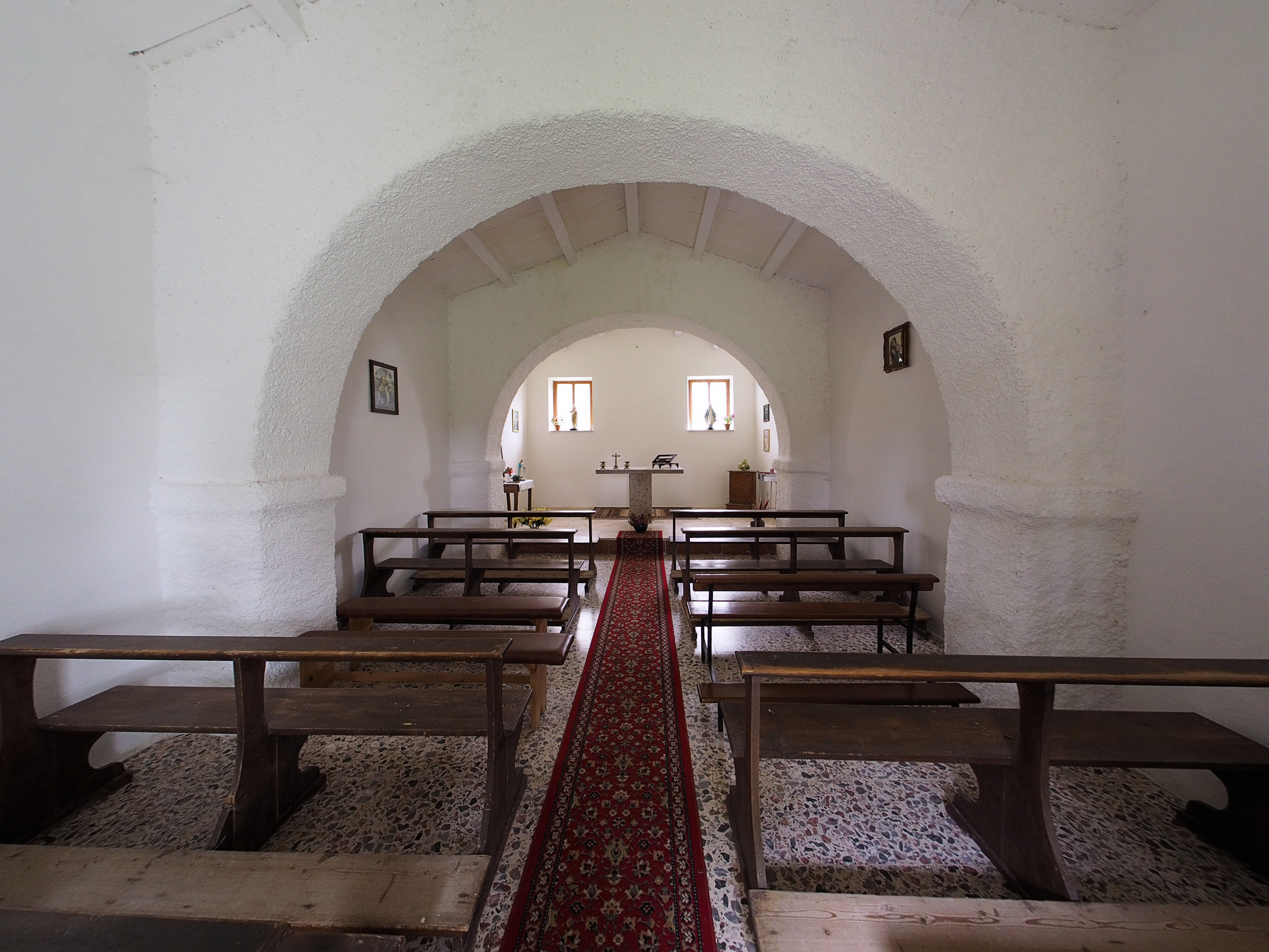 Interno della Chiesa campestre di San Gavino, Proto e Gianuario a Tempio Pausania